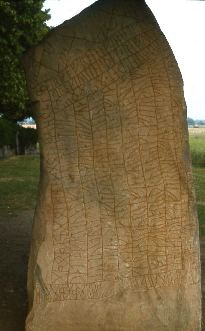 Pierre runique de Rök,près de Odeshog, Suède du sud